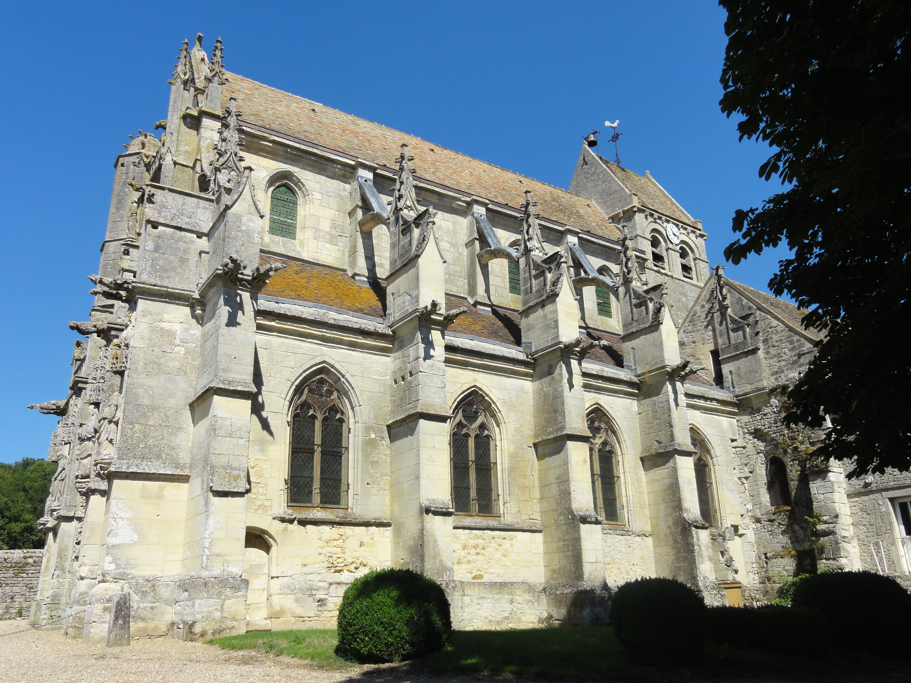 Église Saint-Denis de Serans - voir titre.